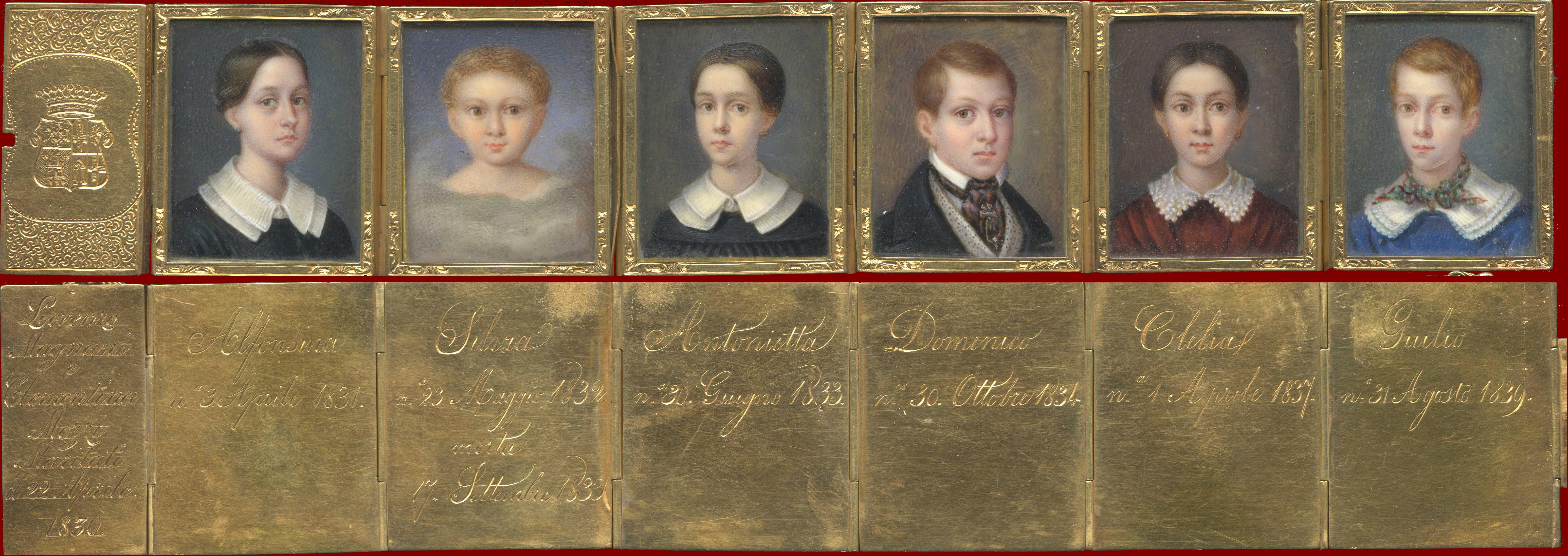 Monile raffigurante i figli di Lorenzo Magnani e Clementina Mozzi, con l'arme partito dei genitori